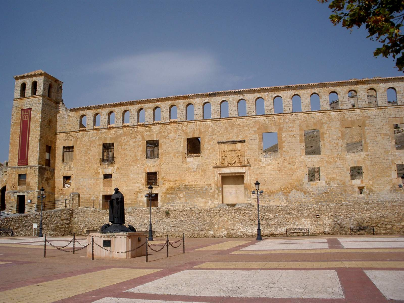 Palacio de los Marqueses de Berlanga (o de los Duques de Frías), en Berlanga de Duero, Soria.